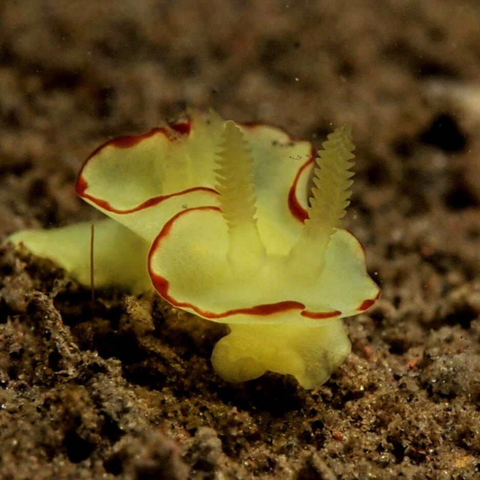 Diversidoris flava, Bali, Indonesia